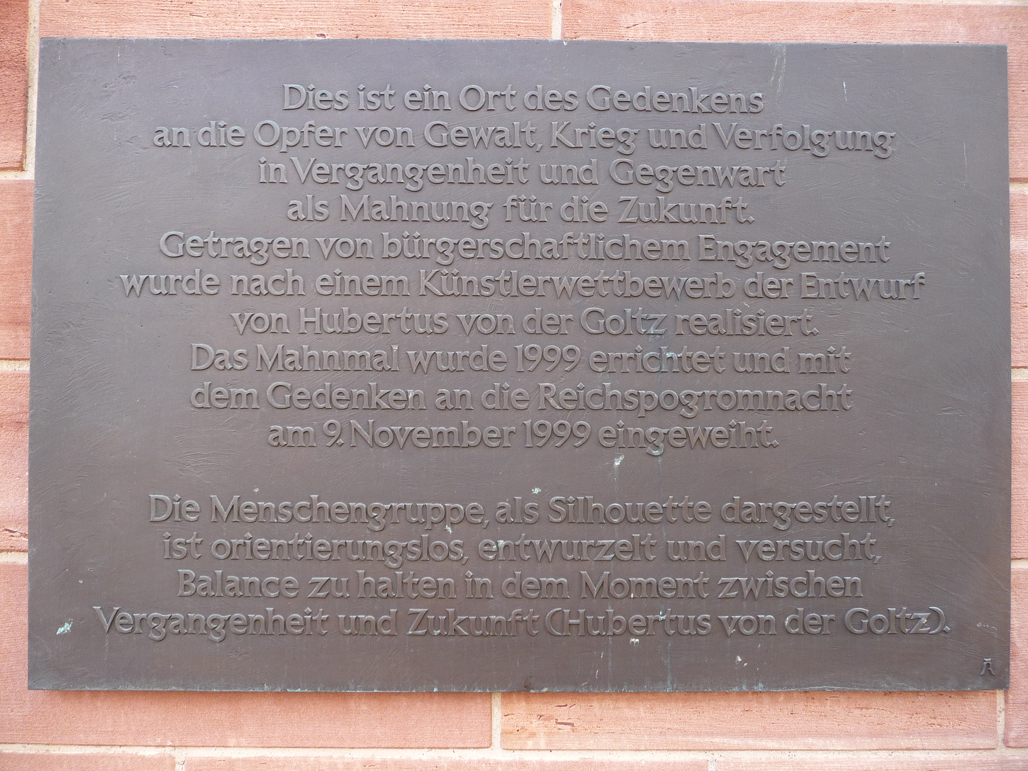 Informationstafel am 1999 aus rotem Odenwälder Sandstein errichteten Mahnmal für die Opfer von Gewalt, Krieg und Verfolgung in Weinheim (Rhein-Neckar-Kreis, Baden-Württemberg, Deutschland).